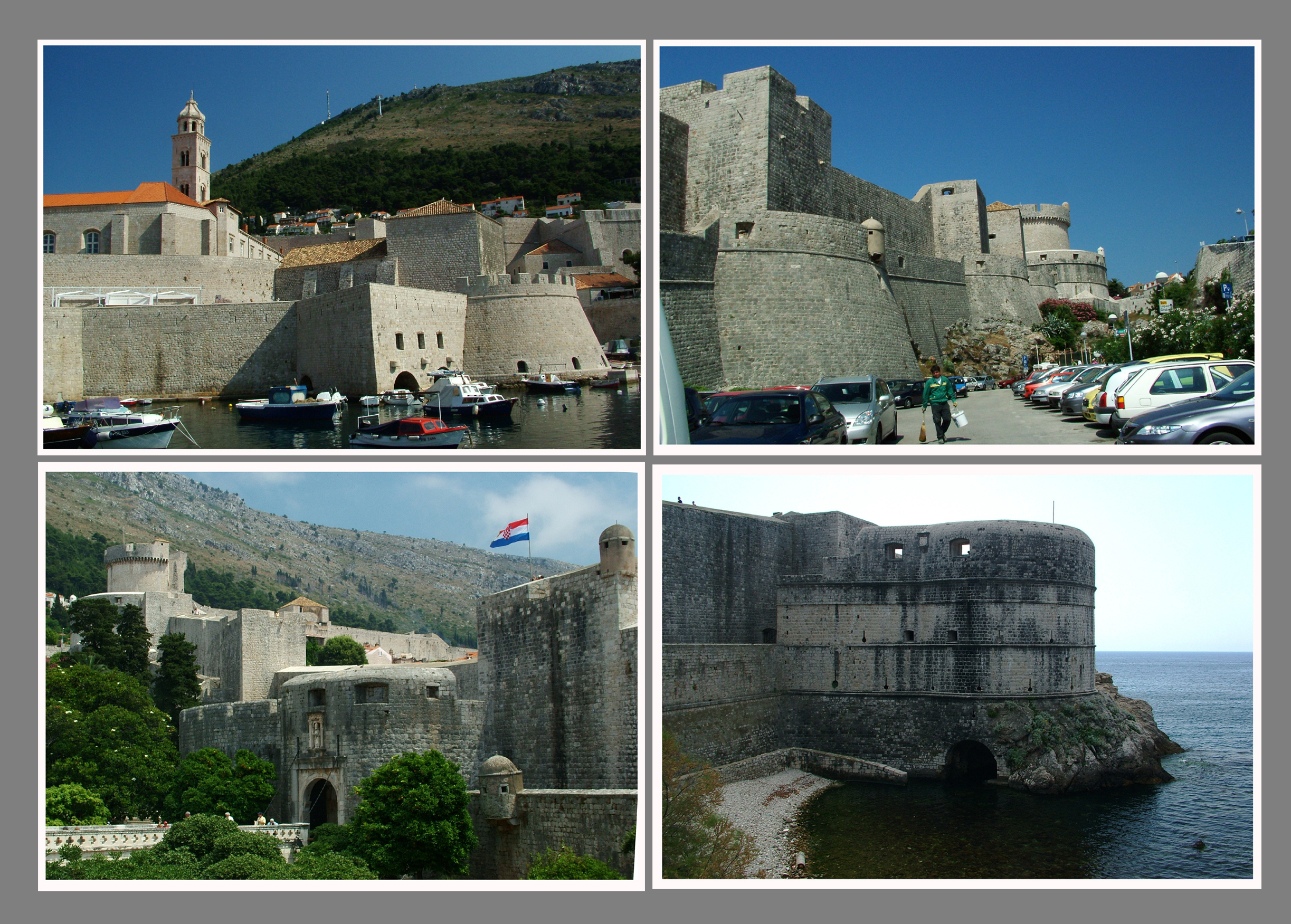 Ragusinum erődítménye (Dubrovnik)